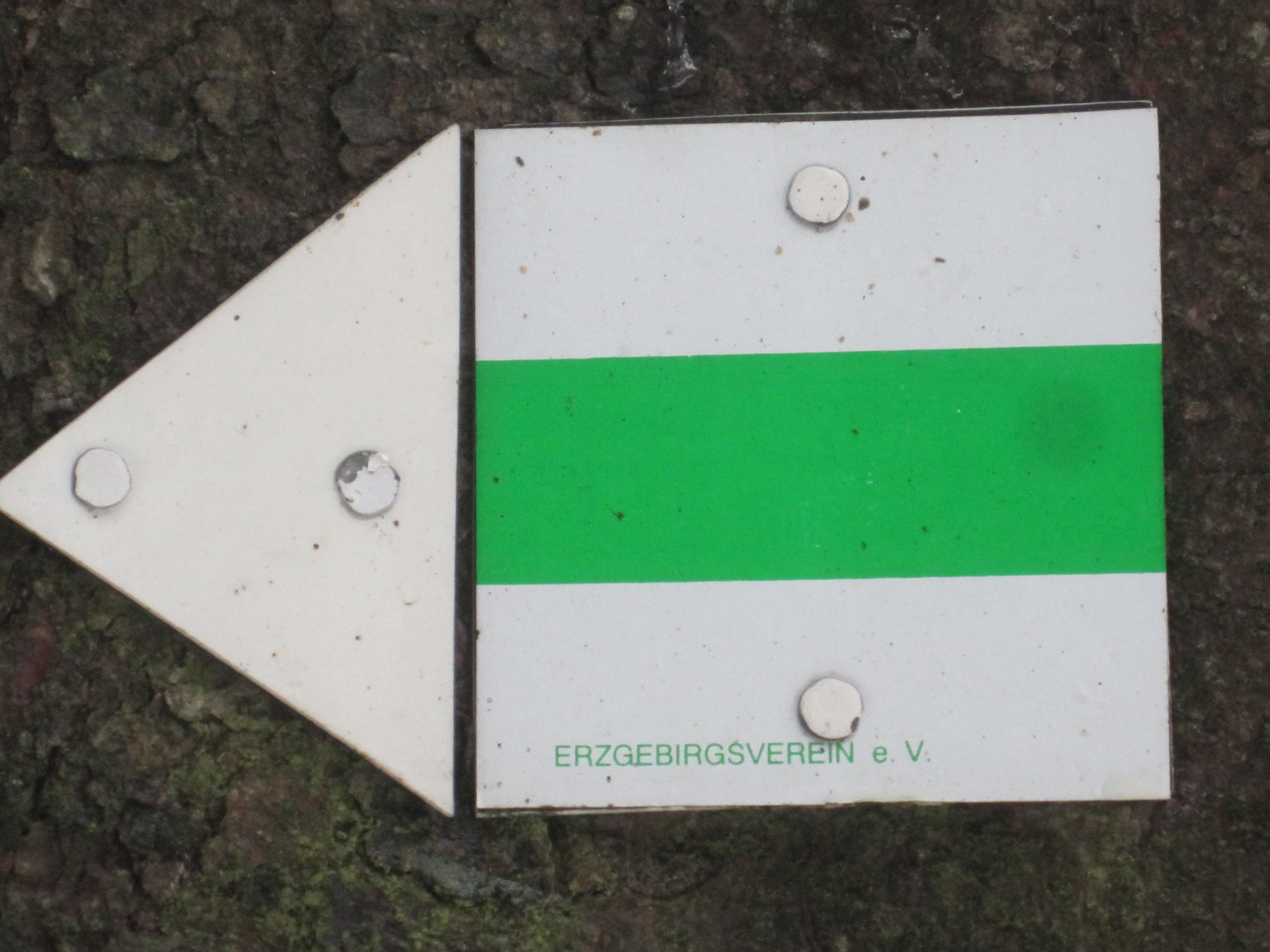 Wegmarkierung des Erzgebirgsvereins mit an einen Baum genagelten Blechschildern: Ein weiß gestrichener Pfeil gibt die Richtung an, ein weiß-grün-weiß gestrichenes Quadrat, beschriftet mit „Erzgebirgsverein“, kennzeichnet den Weg. Selbst die Nägelköpfe wurden weiß gestrichen. Gefunden am 1. Dezember 2013 an der "Hindenburg-Quelle" am Tannenbach in Schönheide im Erzgebirge.